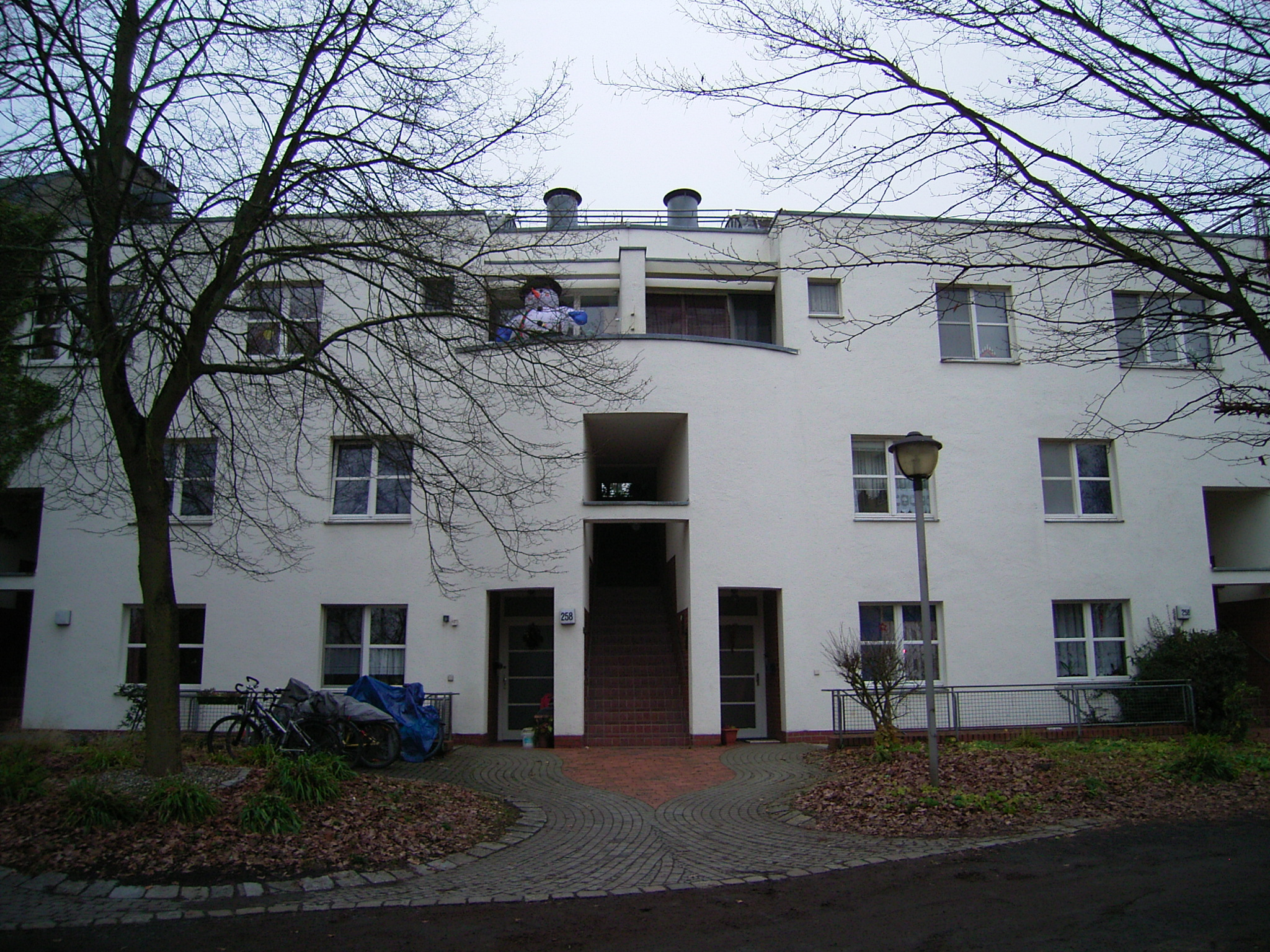 documenta urbana Wohngebäude in Kassel 1979-1982. Teil der „Wohnschlange“